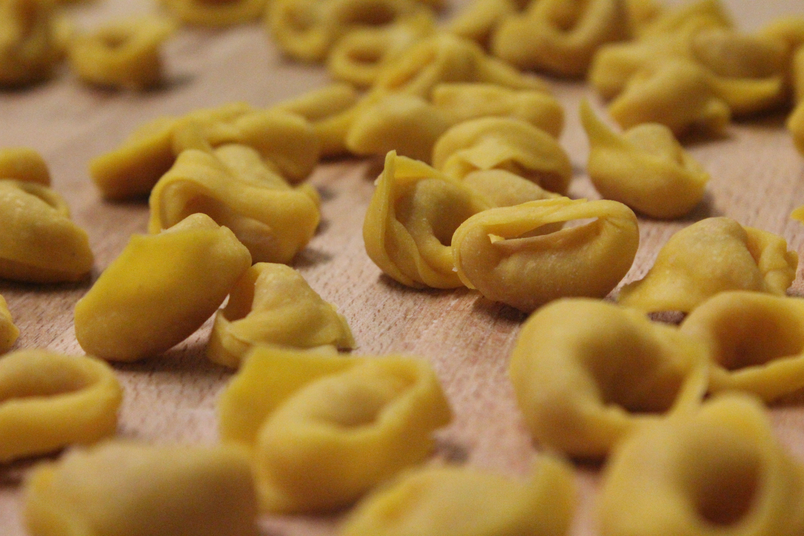 Tortellini bolognesi sul tagliere di legno